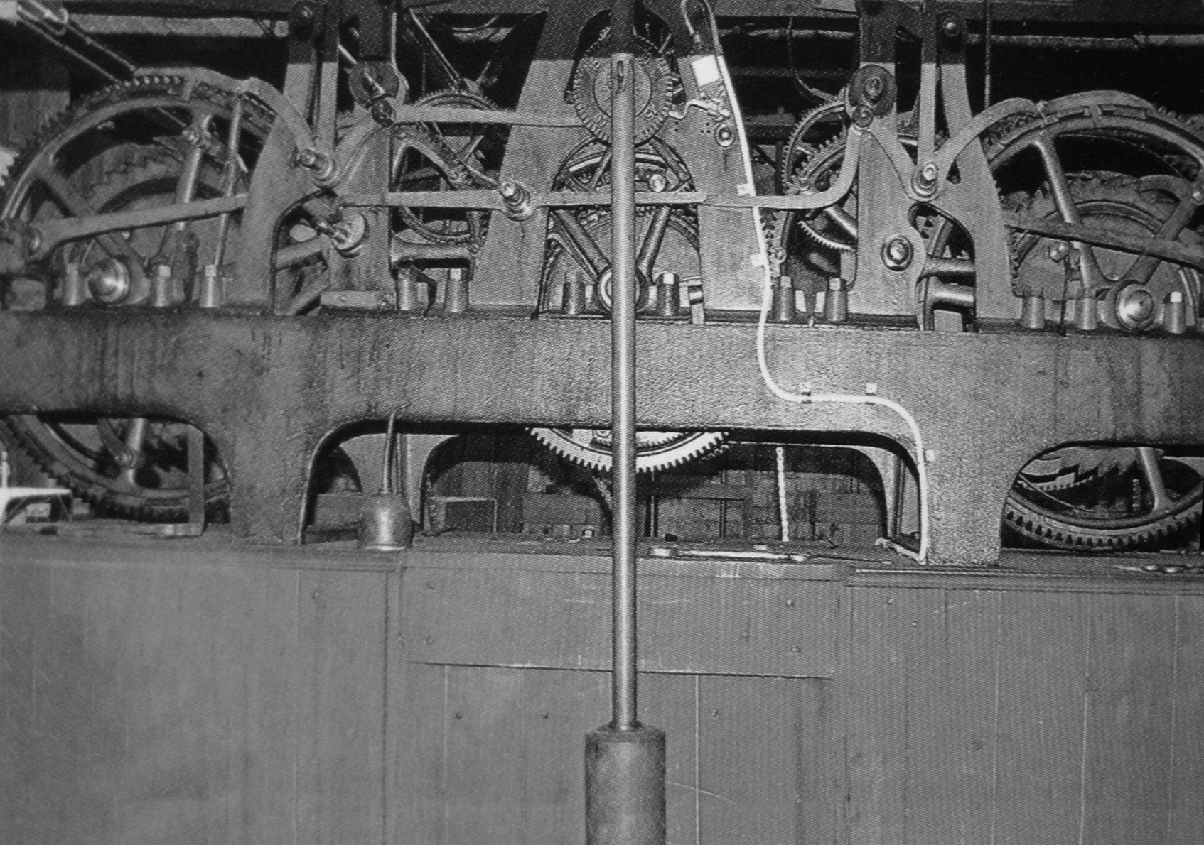 Storkyrkans urverk av fabrikat Linderoths ur